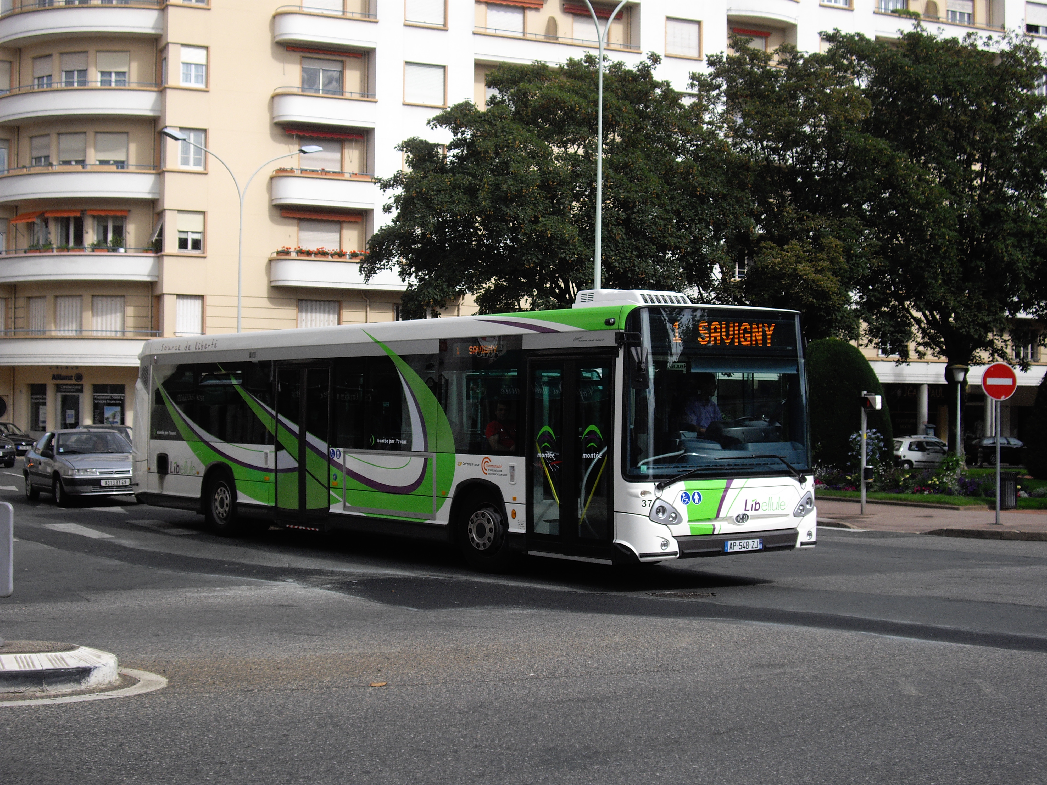 Heuliez GX327 - Villefranche-sur-Saône - Ligne 1 du réseau Libellule dans le centre-ville, près du marché couvert.